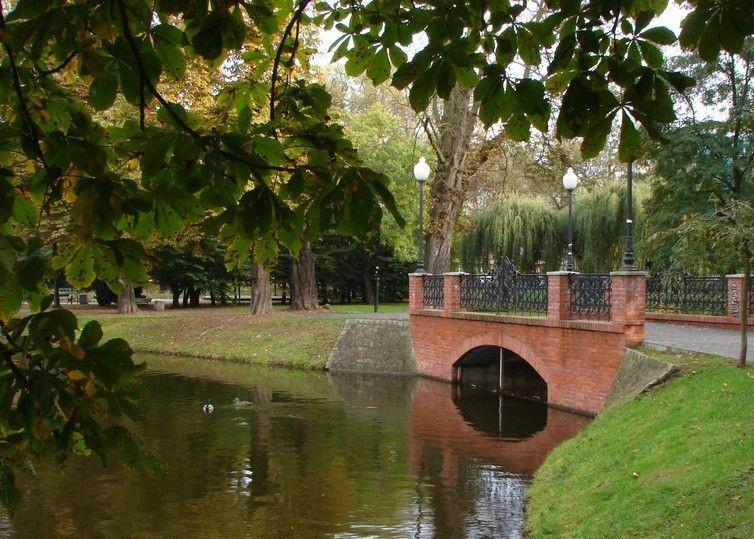 Staw w Parku Wiosny Ludów w Gorzowie WLkp.